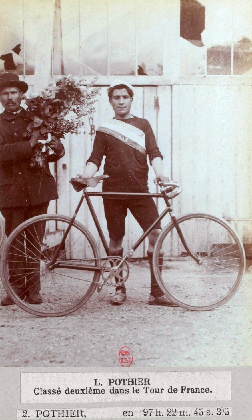 1903 Lucien Pothier, second du Tour de France